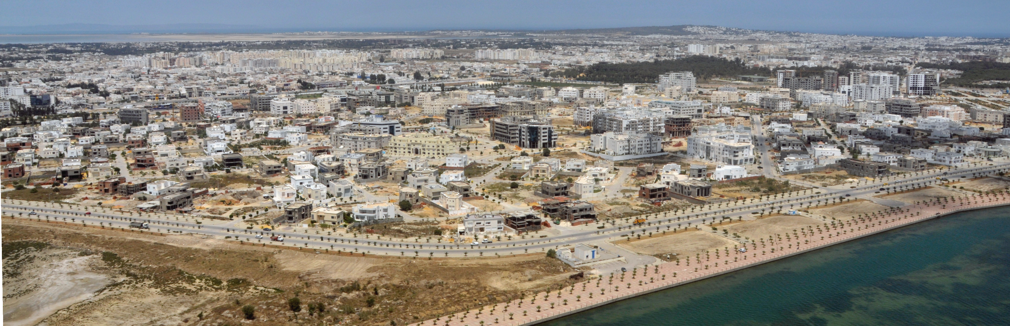 Berges nord-est du Lac de Tunis. Sur la photo on distingue l'aménagement en cours des jardins du Lac et de la cité des pins.